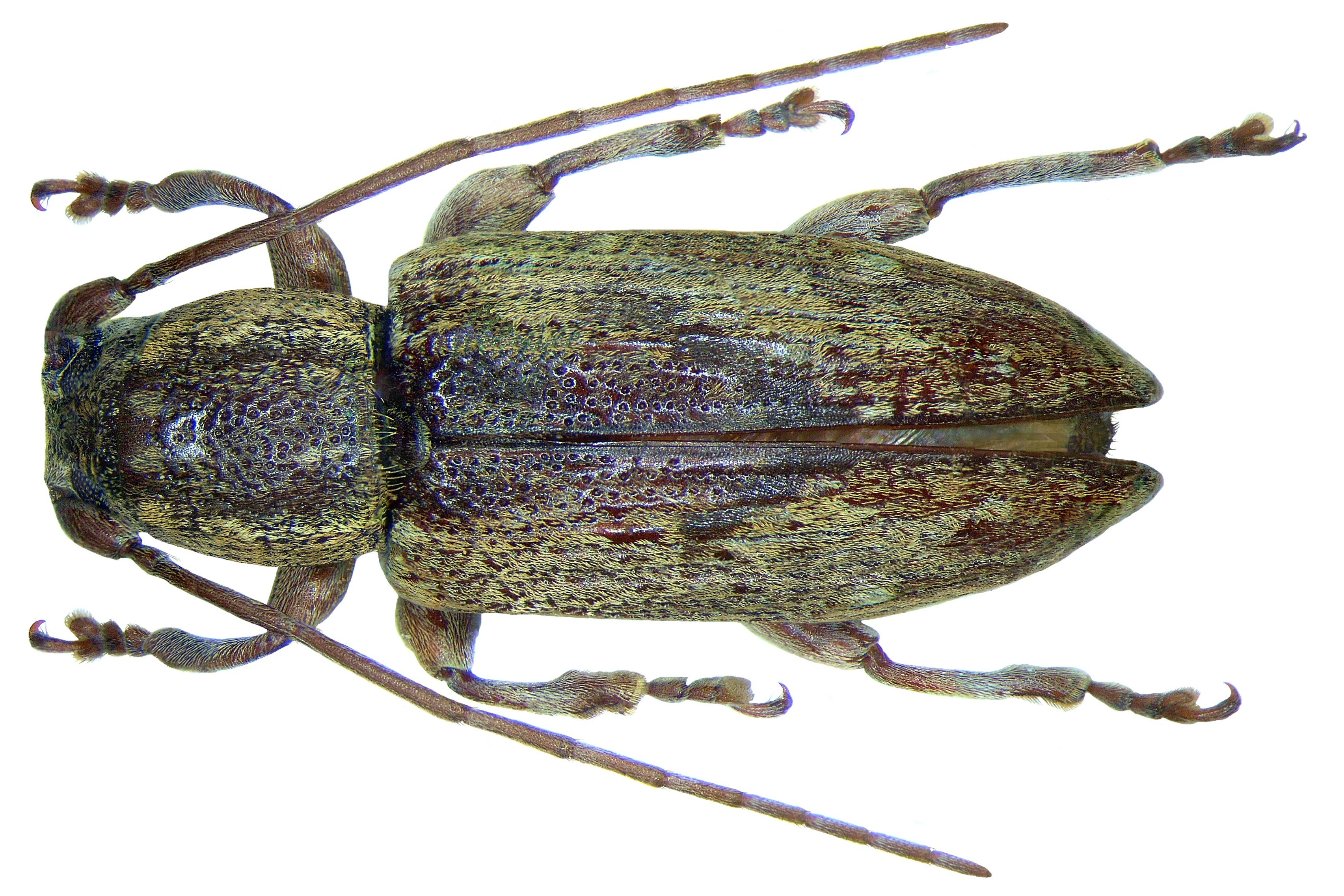 Familie: Cerambycidae Grösse: 8 mm Fundort: Indonesien, Sulawesi det. Breuning, 1938 Holotype, Coll. Museum Brüssel Foto: U.Schmidt, 2008